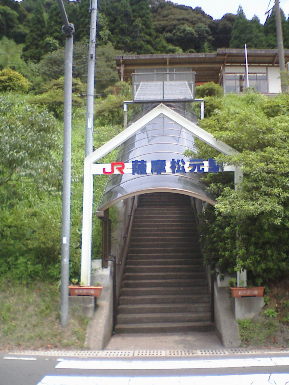 薩摩松元駅入口